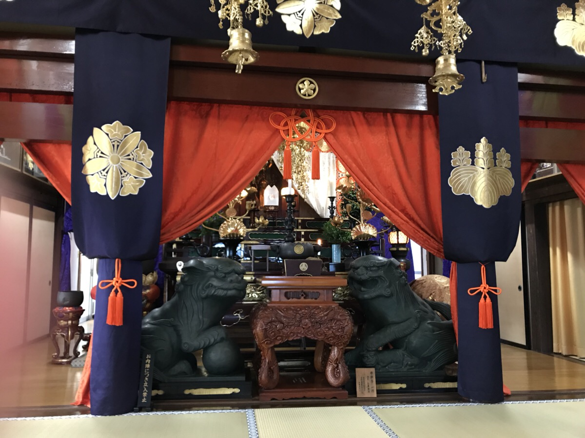 大泉寺 本堂（許可を得て撮影）